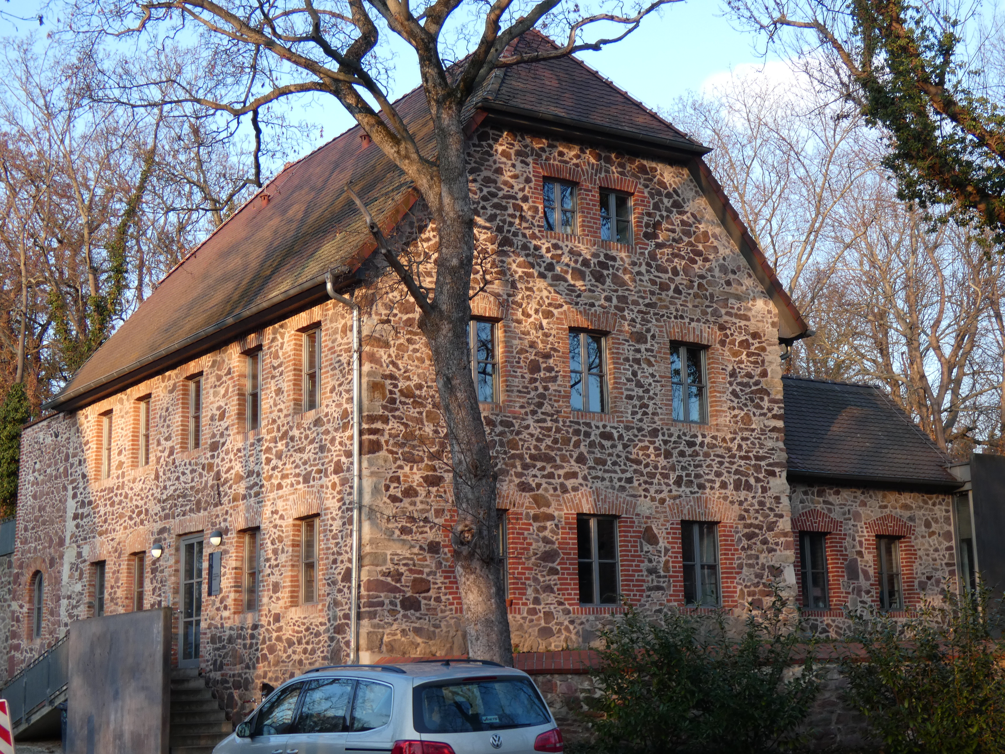 Seebener Straße 2, Halle (Saale), Unterburg Giebichenstein, Gärtnerhaus, Kunsthochschule, Fachgebiet Zeitbasierte Künste